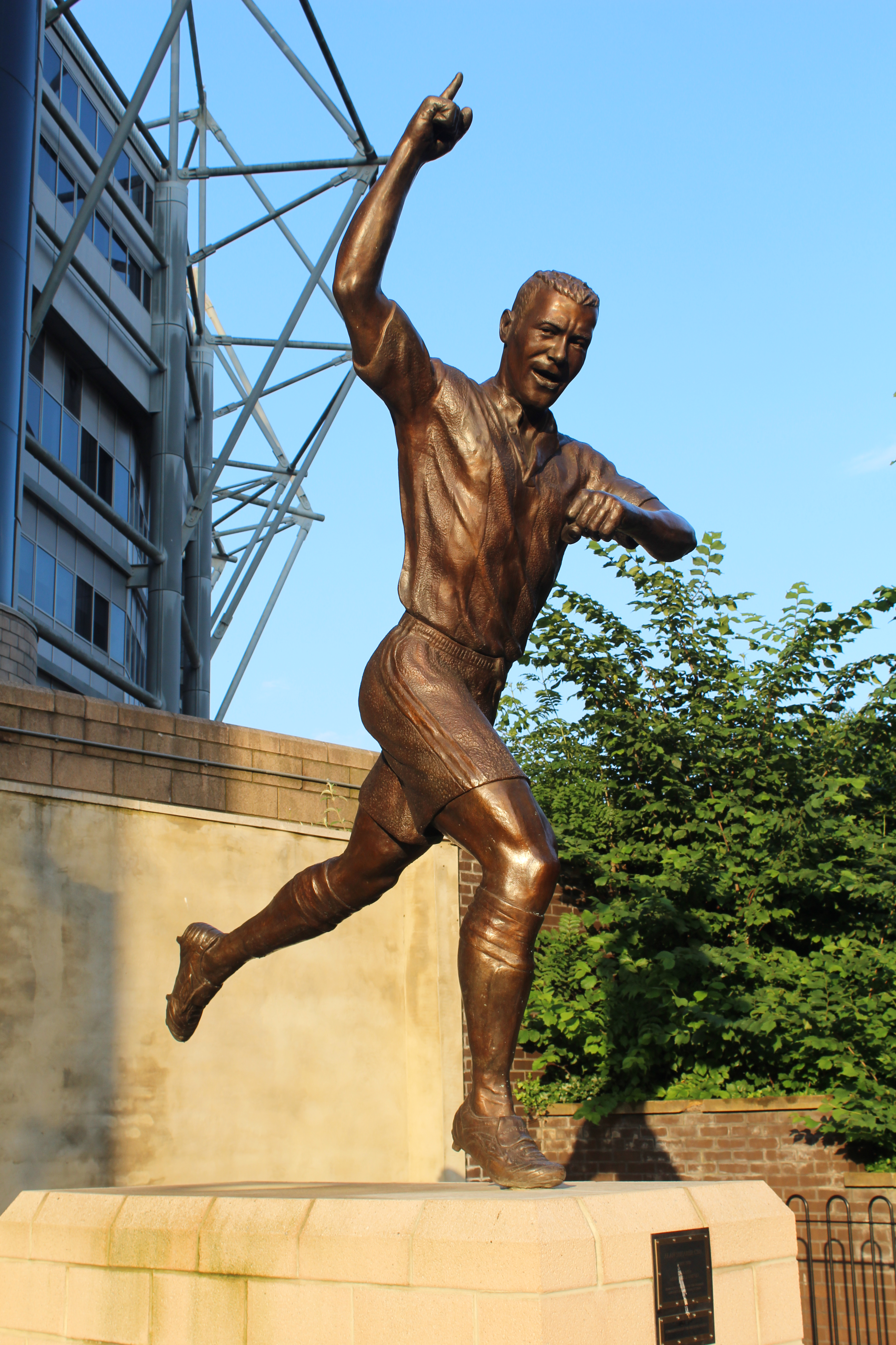 Statue d'Alan Shearer, Newcastle upon Tyne.